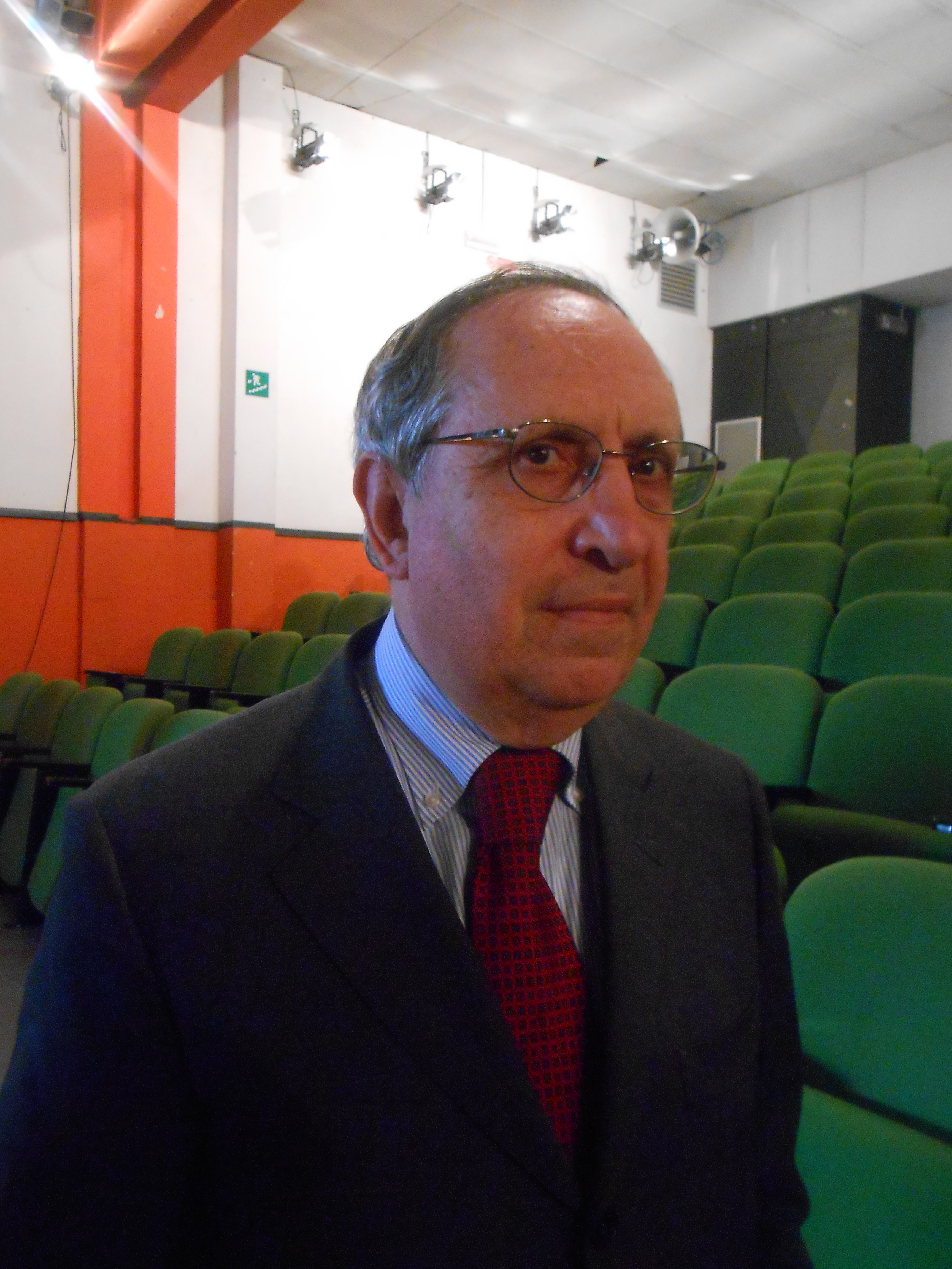 Raffaele Besso responsabile al bilancio della Comunità ebraica di Milano - Milano 2014